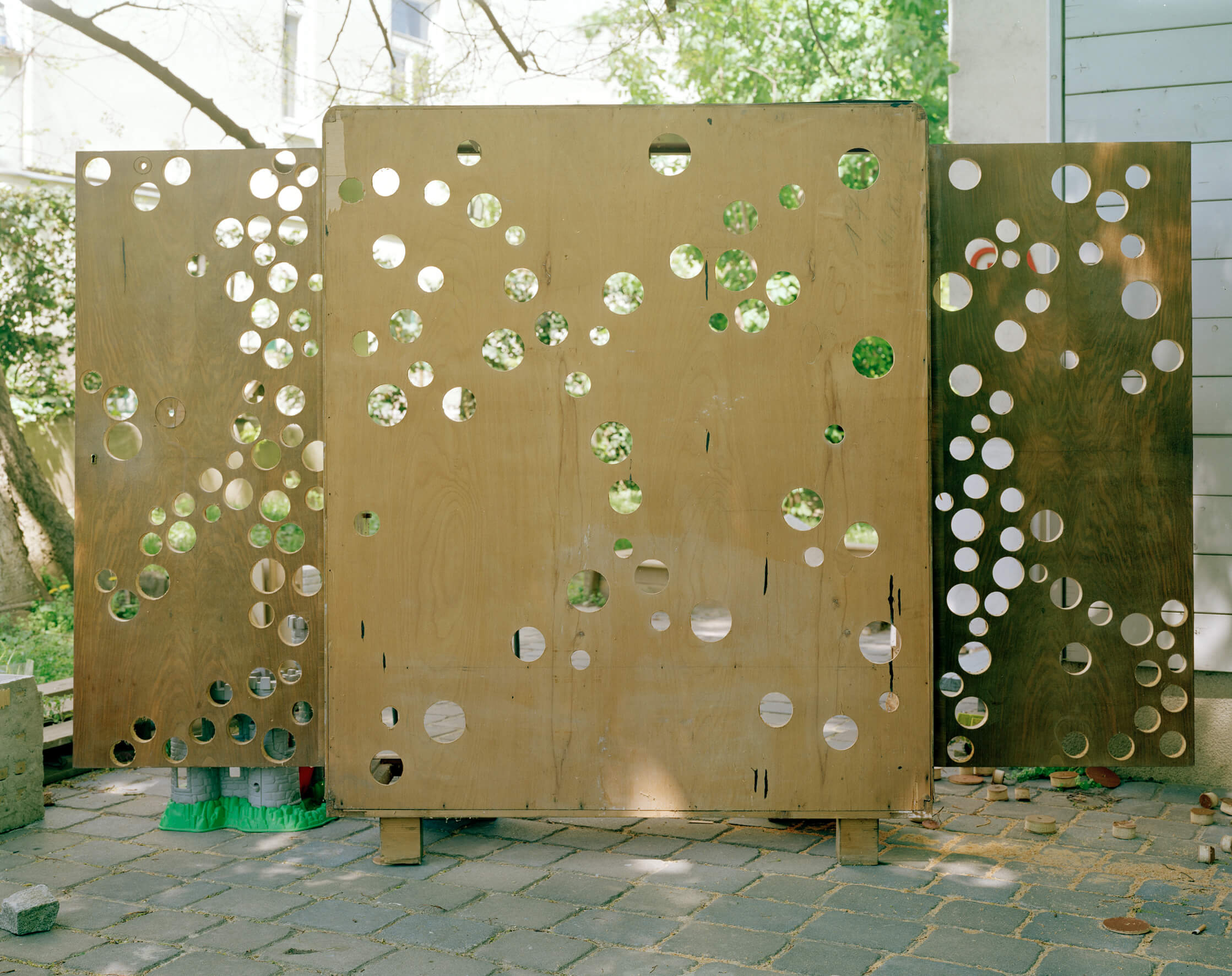 Farbfotografie